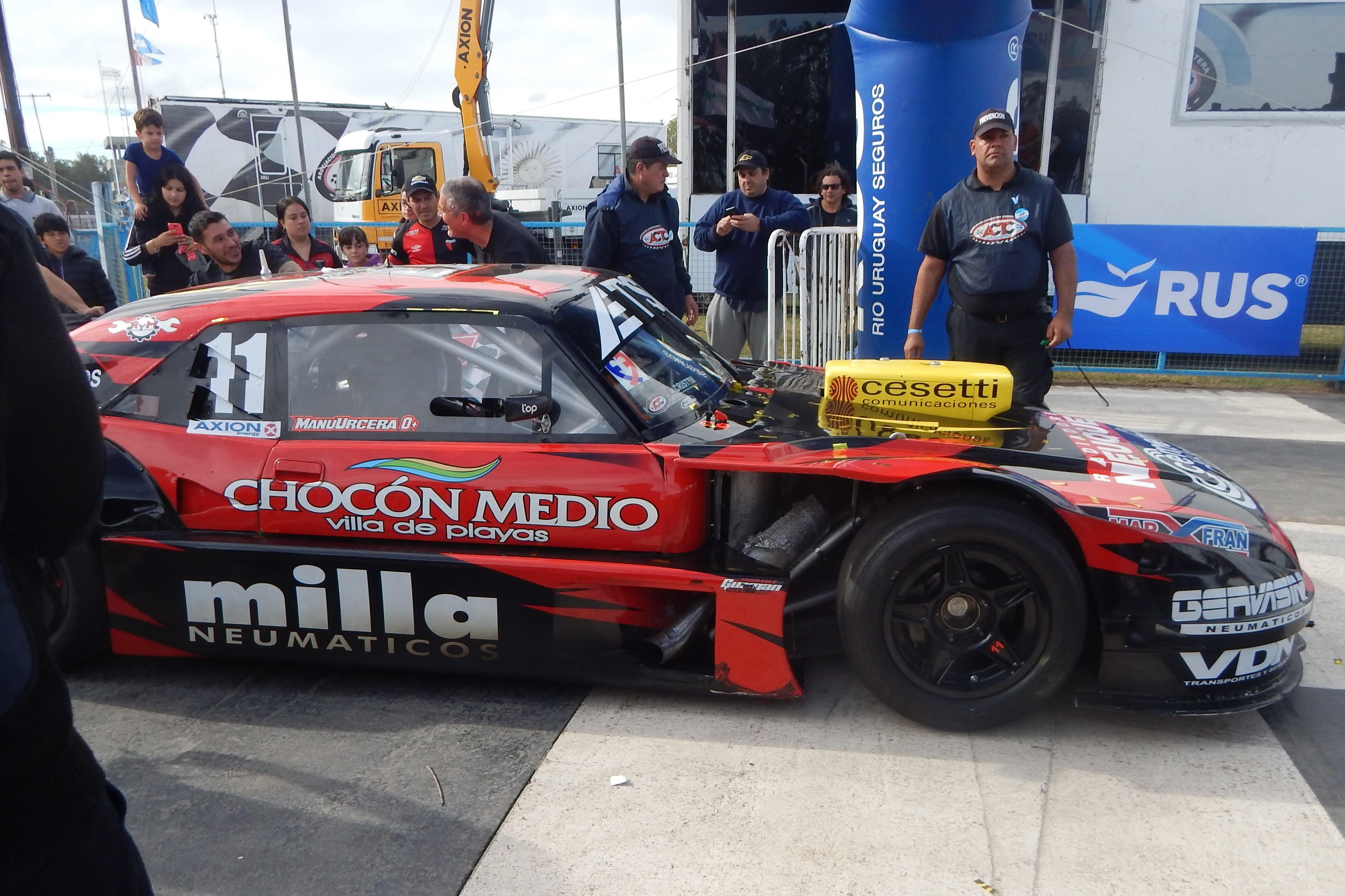 José Manuel Urcera, TC Rafaela 2019.